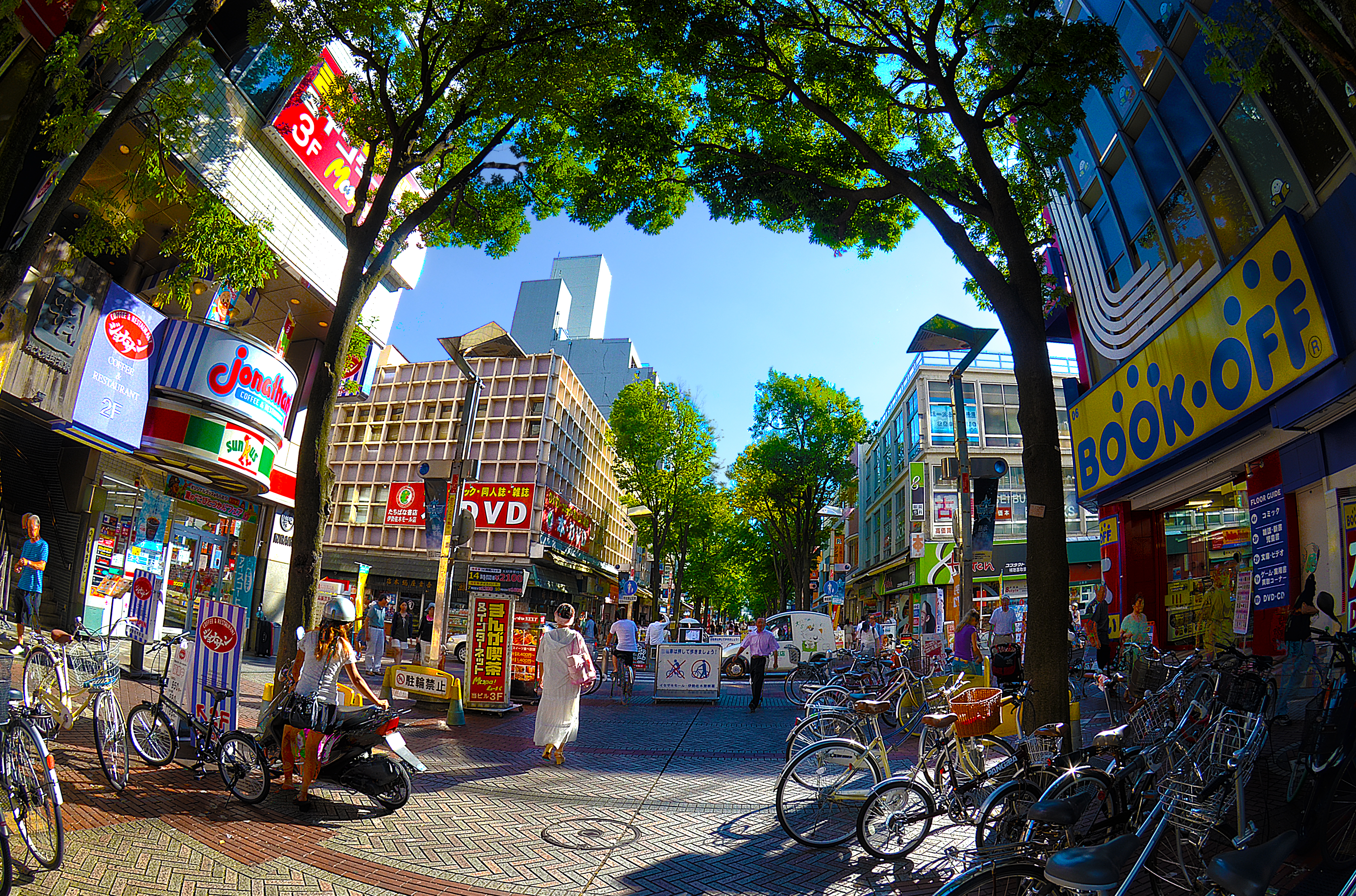 伊勢佐木町2012年8月24日(金)に撮影しました。